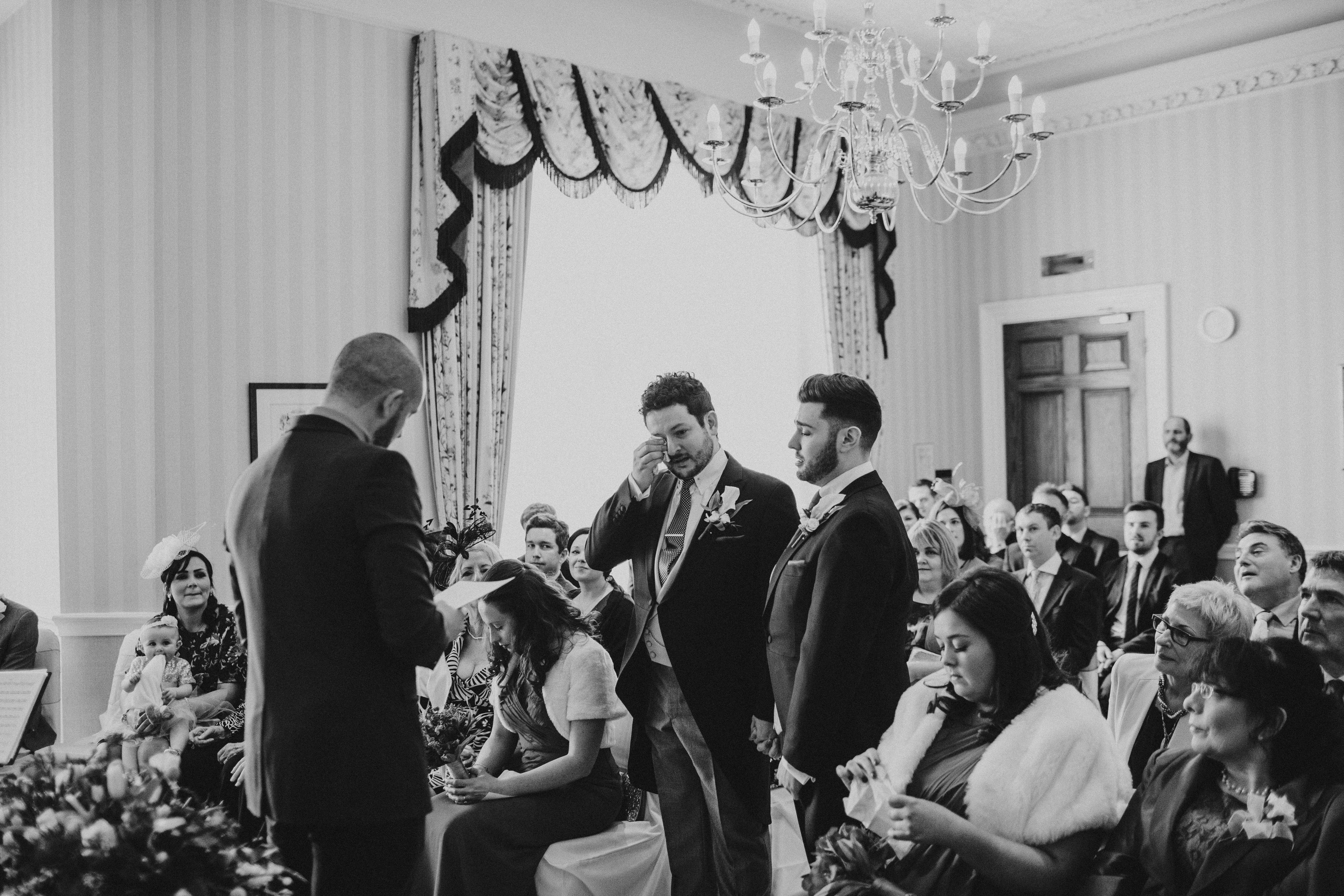 Matrimonio nel Regno Unito del 21 febbrio 2015